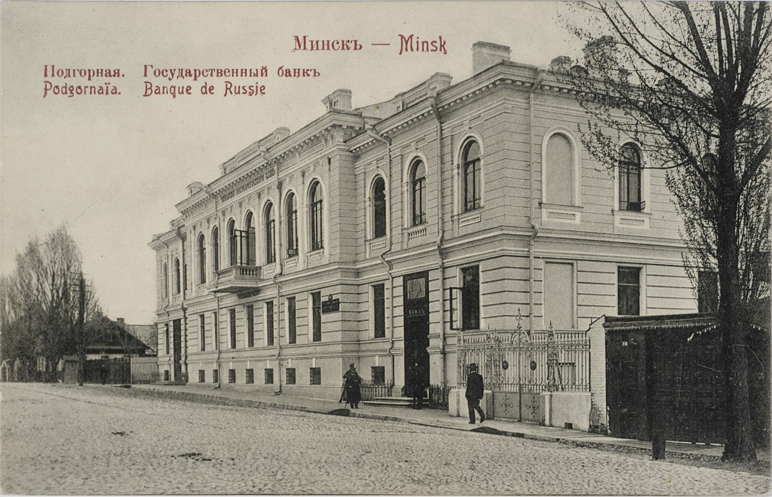 Будынак аддзялення Дзяржаўнага банка Расіі.